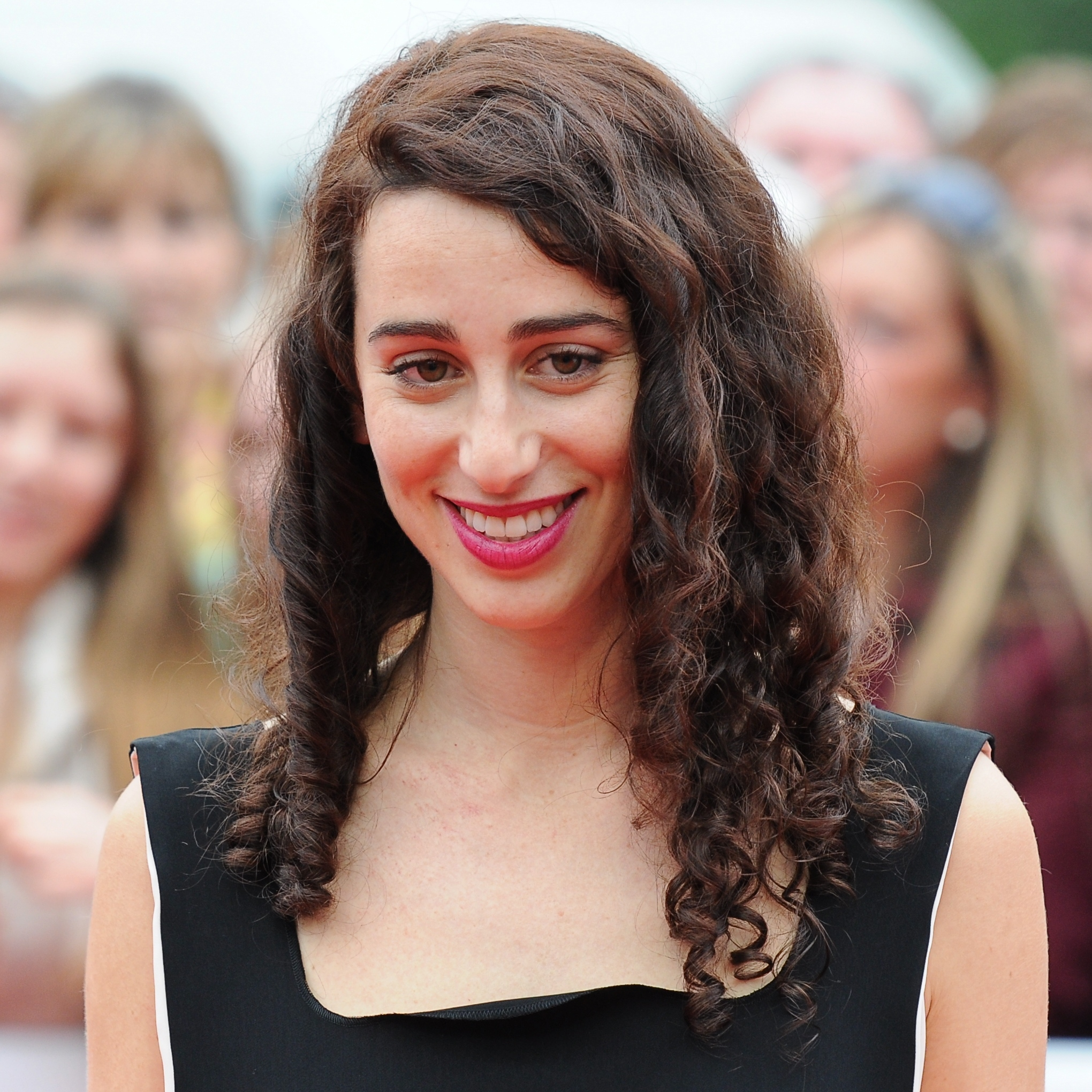 Alexa Karolinski bei der Verleihung des Grimme-Preises 2014.